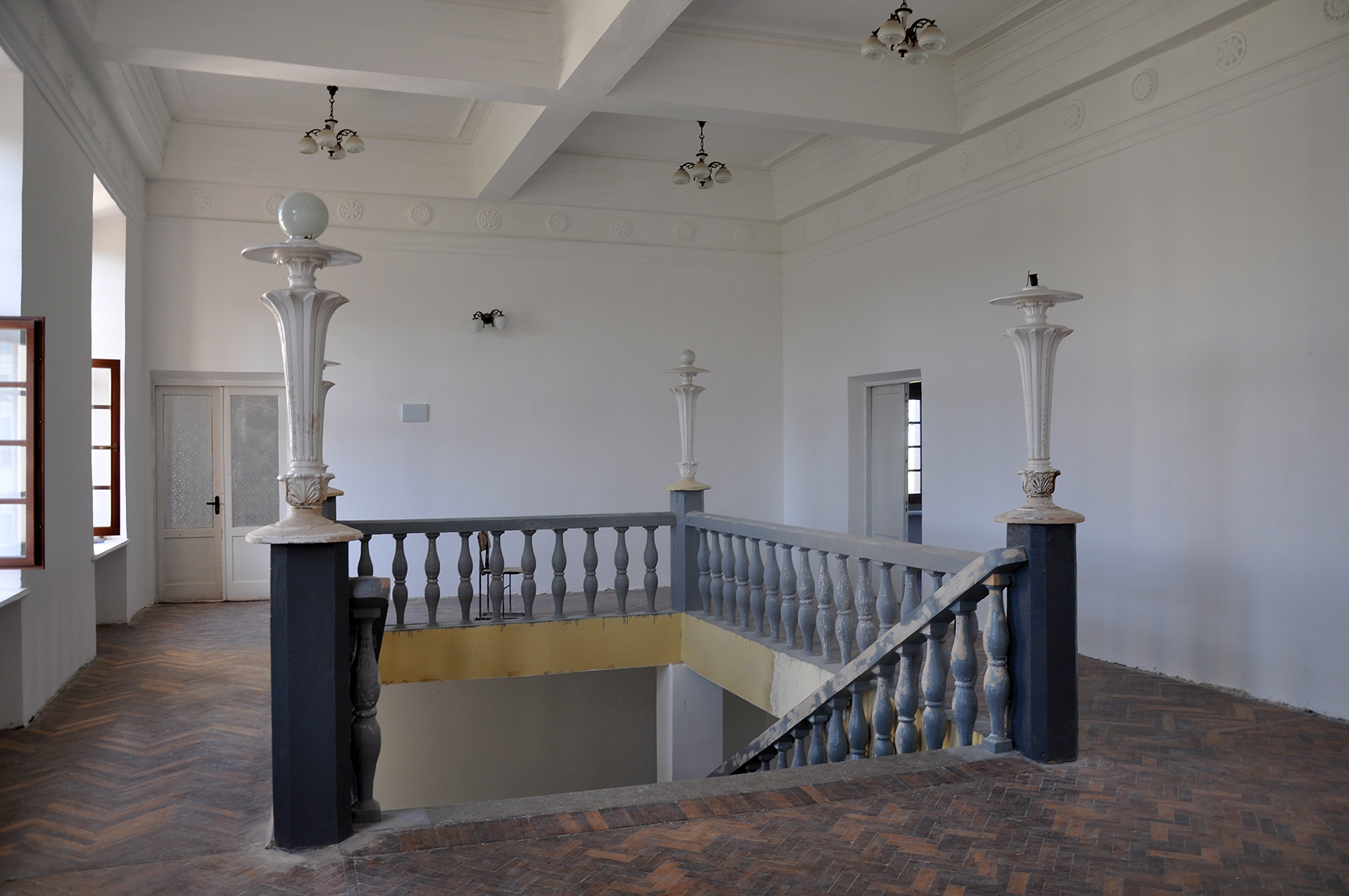 Князівський палац, у якому бував Шевченко Т., смт Вишнівець, вул. Замкова, 5